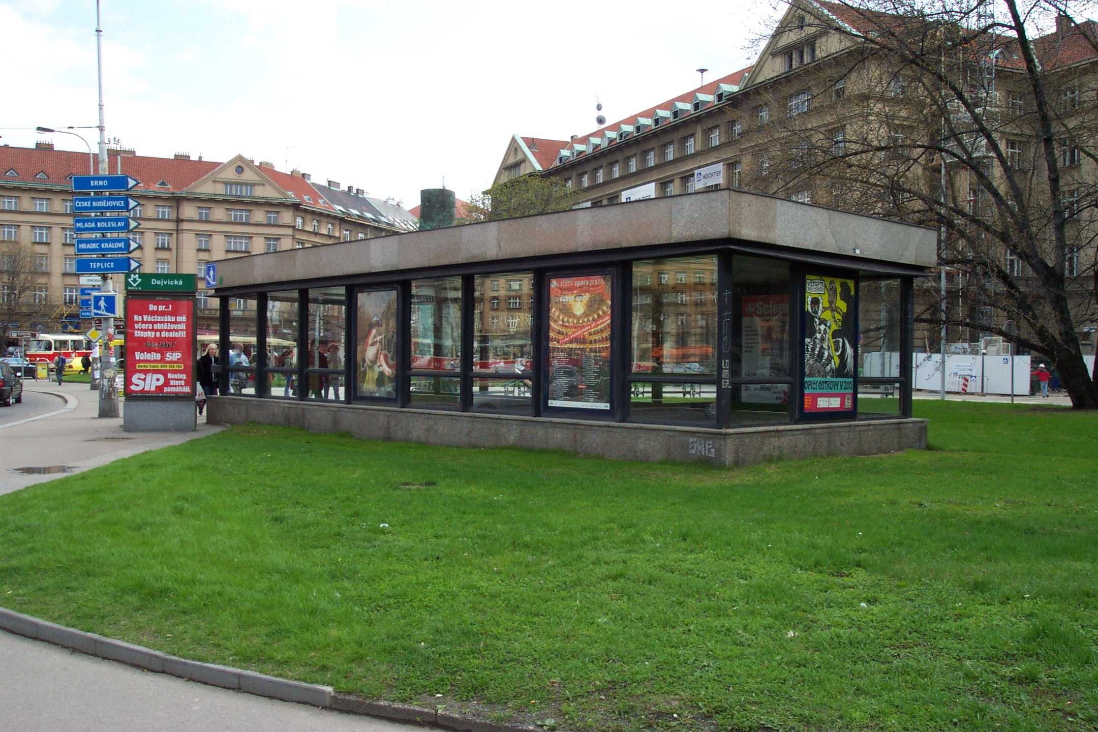 Metro station Dejvická, vestible - Vestibul stanice metra Dejvická